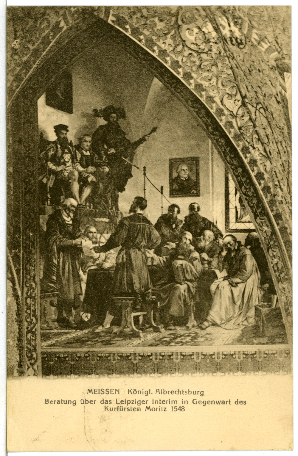 Meißen; Albrechtsburg - Beratung über das Leipziger Interim This postcard is from publisher Brück & Sohn in Meißen ( This postcard has a unique number 11787 and is available in a higher resolution at the publisher. This images was uploaded in a cooperation project between Wikipedians and the publisher.